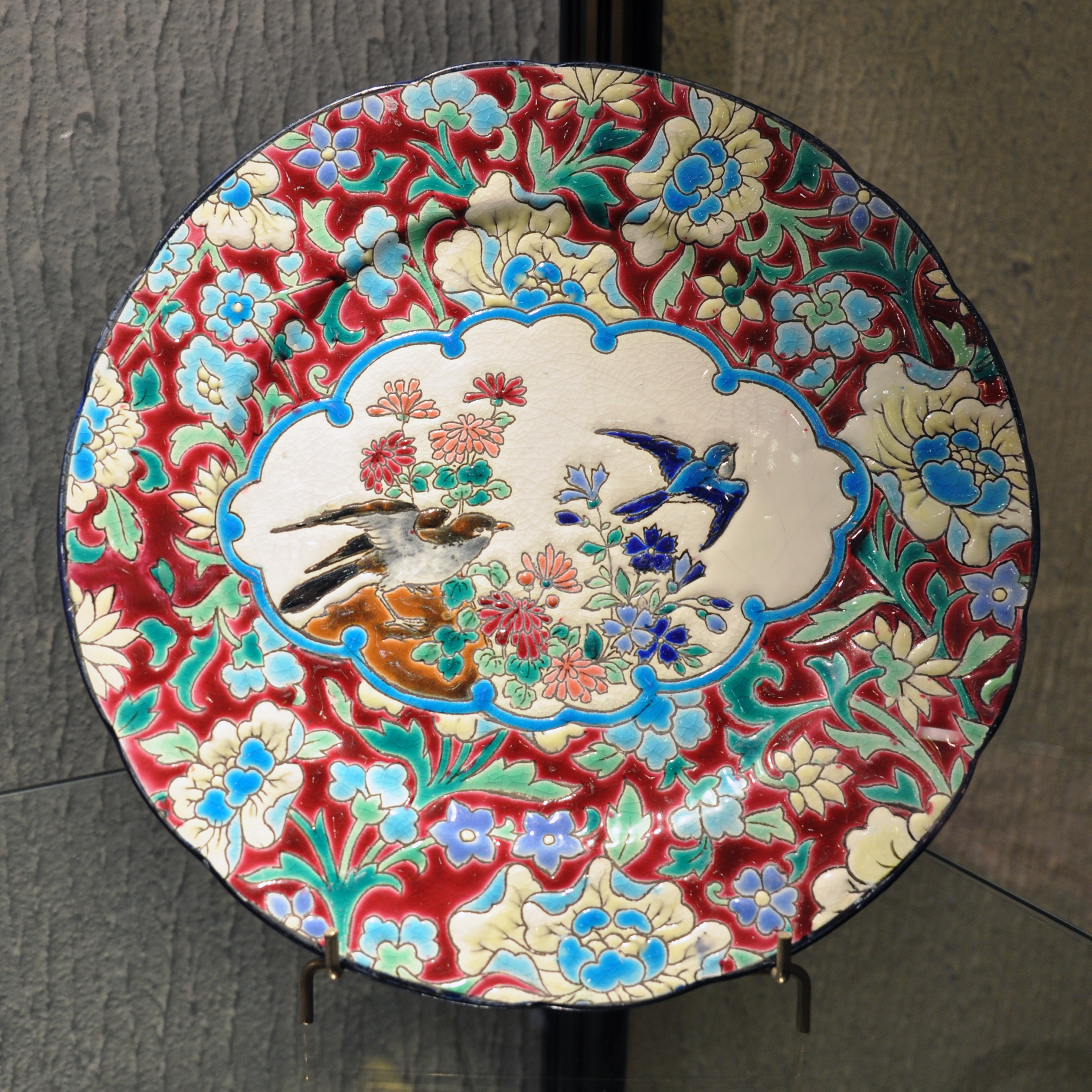 Assiette à fond pourpre avec oiseaux, 19ème siècle, émaux de Longwy. Musée municipal de Longwy.